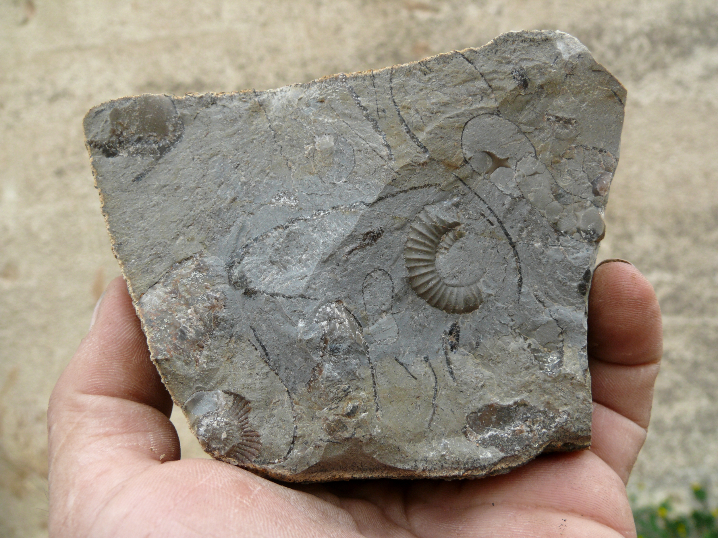 "Hammerstädter Ammonitenseife", Jurensismergel, Unterer Jura, Albvorland